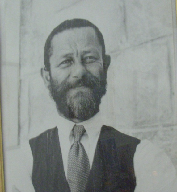 תמונתו של זאב מתתיהו פרל